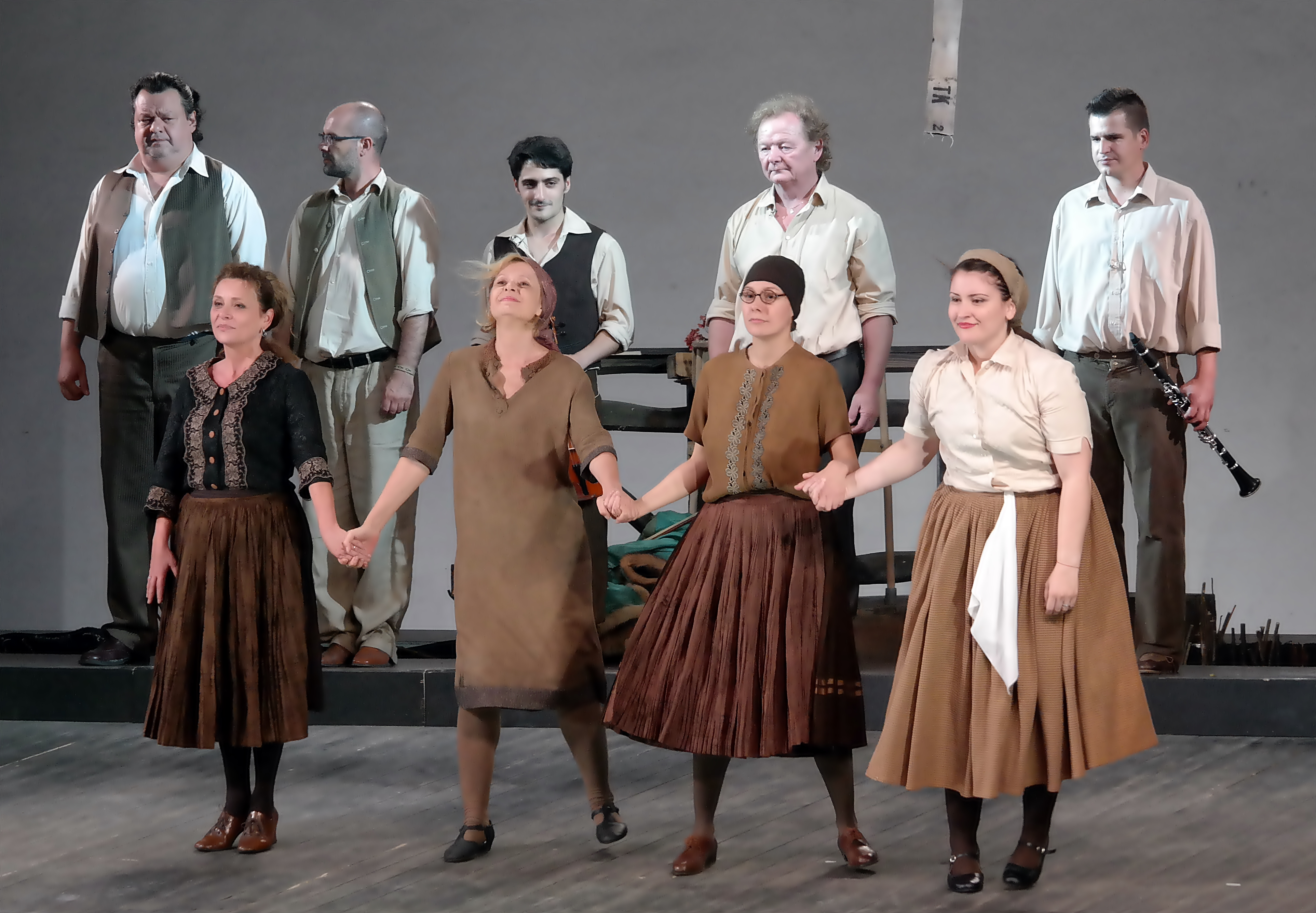 A falu rossza (Weöres Sándor Színház) tapsrend. Balról-jobbra; felső sor: Horváth Ferenc, Kiss Krisztián, Horváth Dániel, Peltzer Géza, Hotzi Péter. Alsó sor: Németh Judit, Vlahovics Edit, Nagy Cili, Papp-Ionescu Dóra